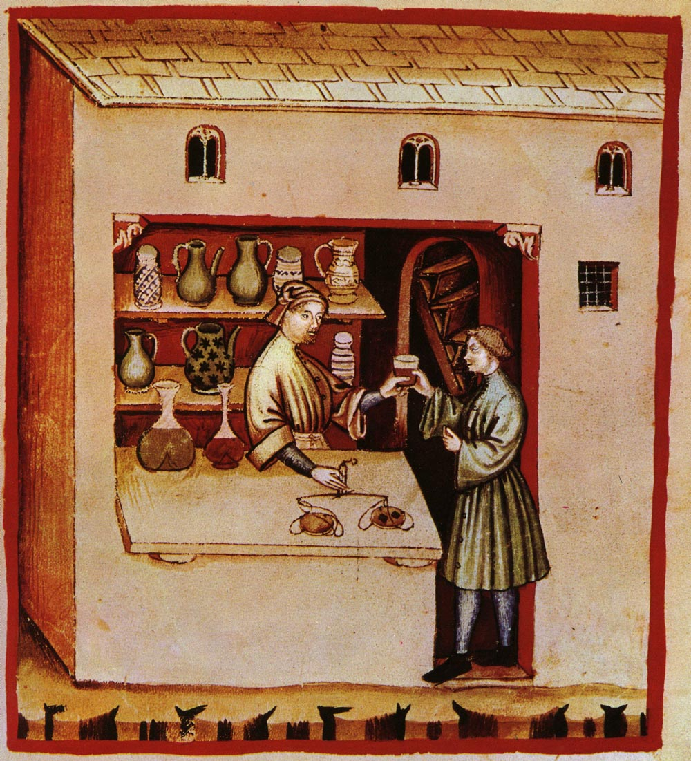 Tacuina sanitatis (XIV century) 2-aspetti di vita quotidiana, medicine,Taccuino Sanitatis